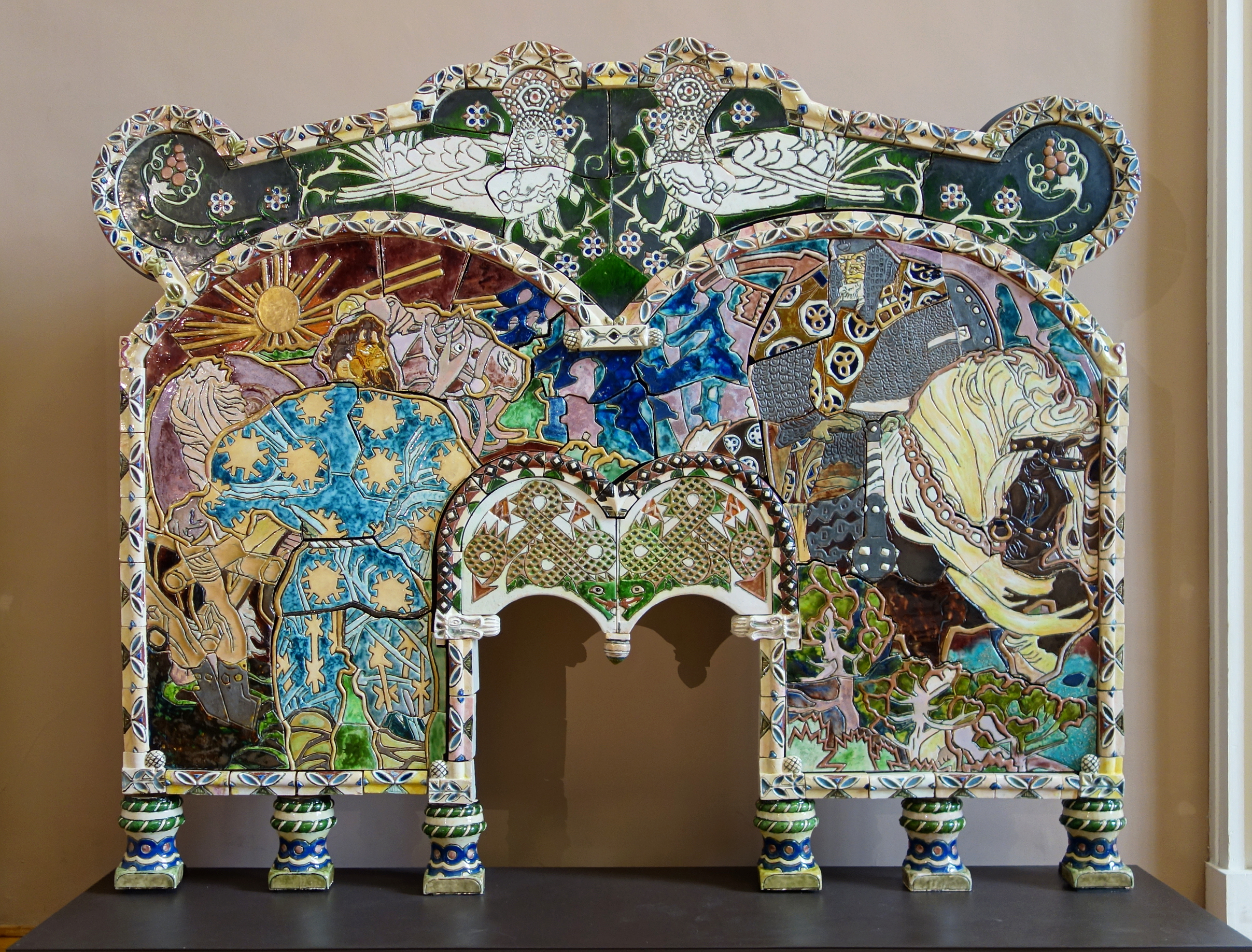 Cheminée de la légende de Volga et Mikoula